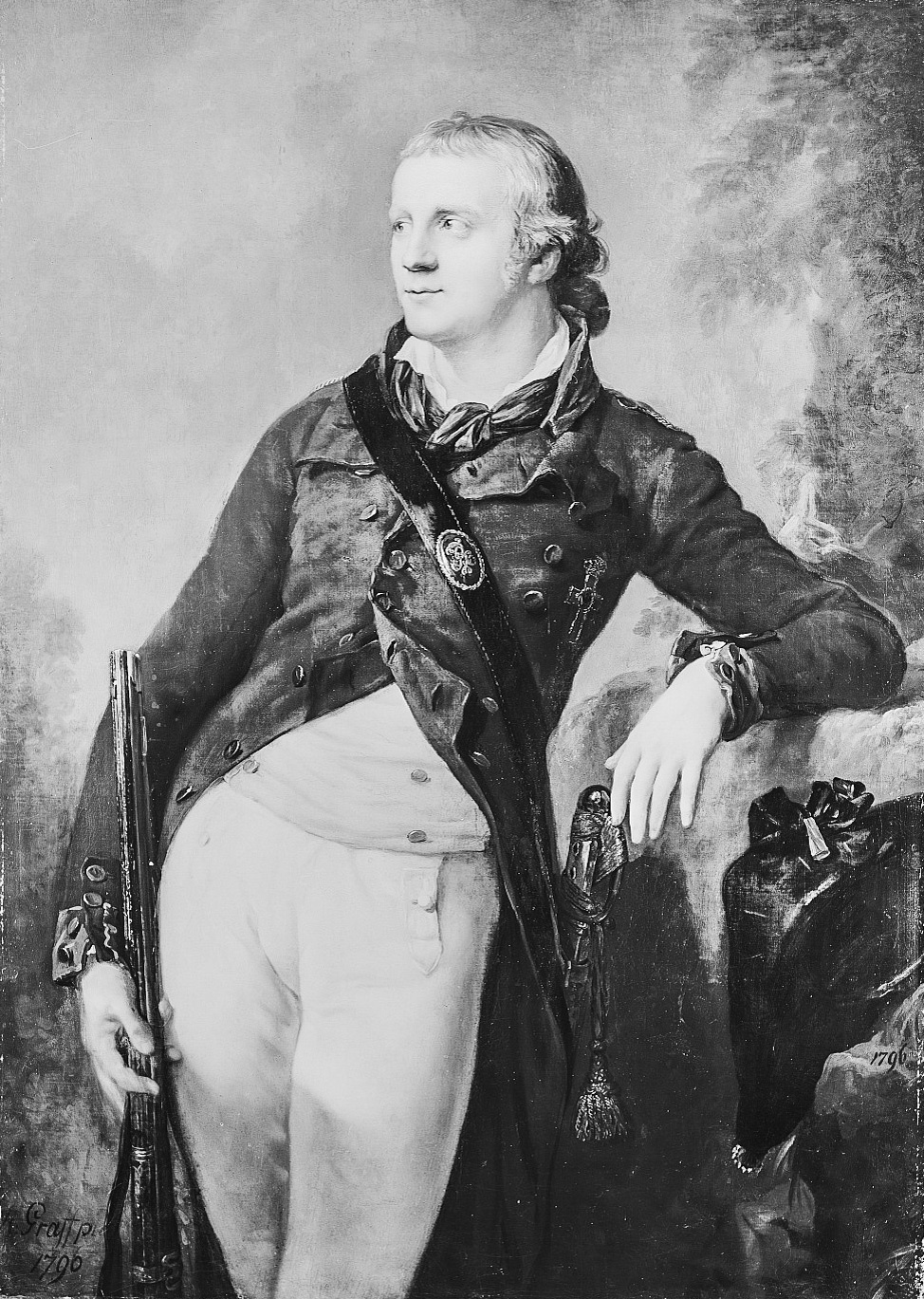 Knietück von Karl Friedrich Moritz Paul Graf Brühl.